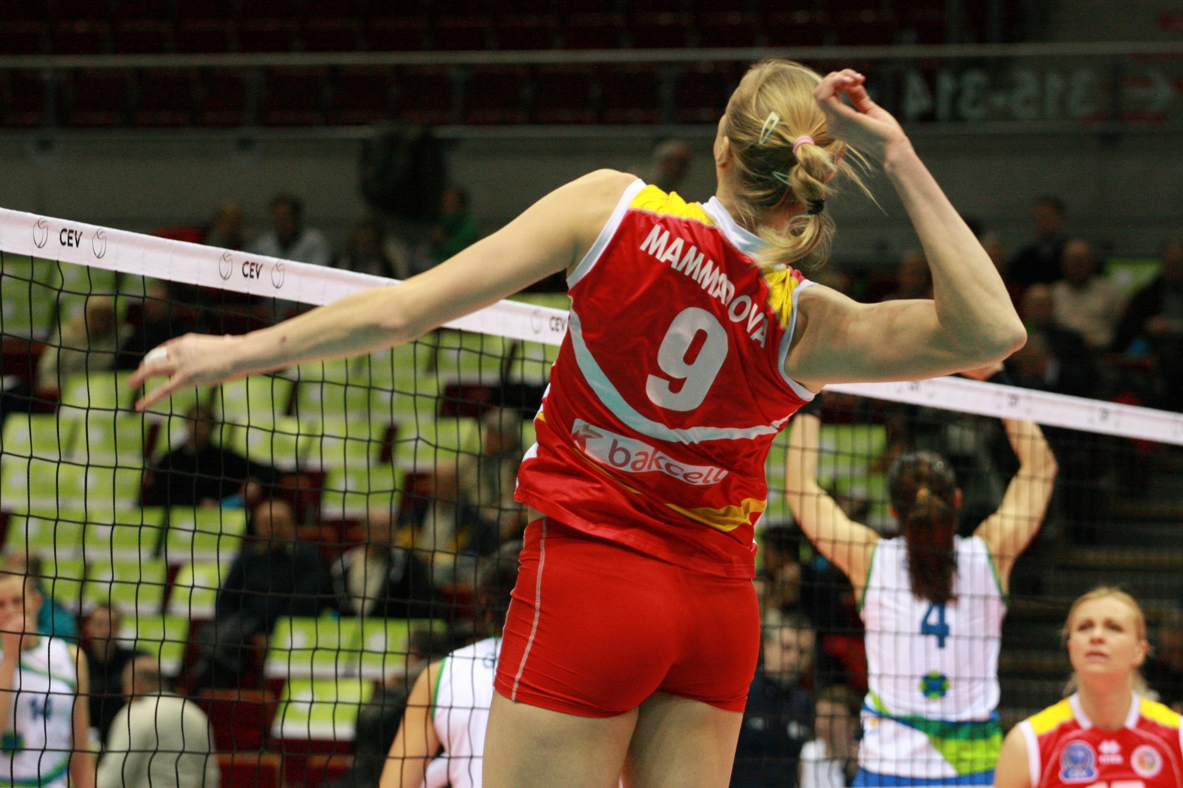 Atom Trefl Sopot vs Rabita Baku